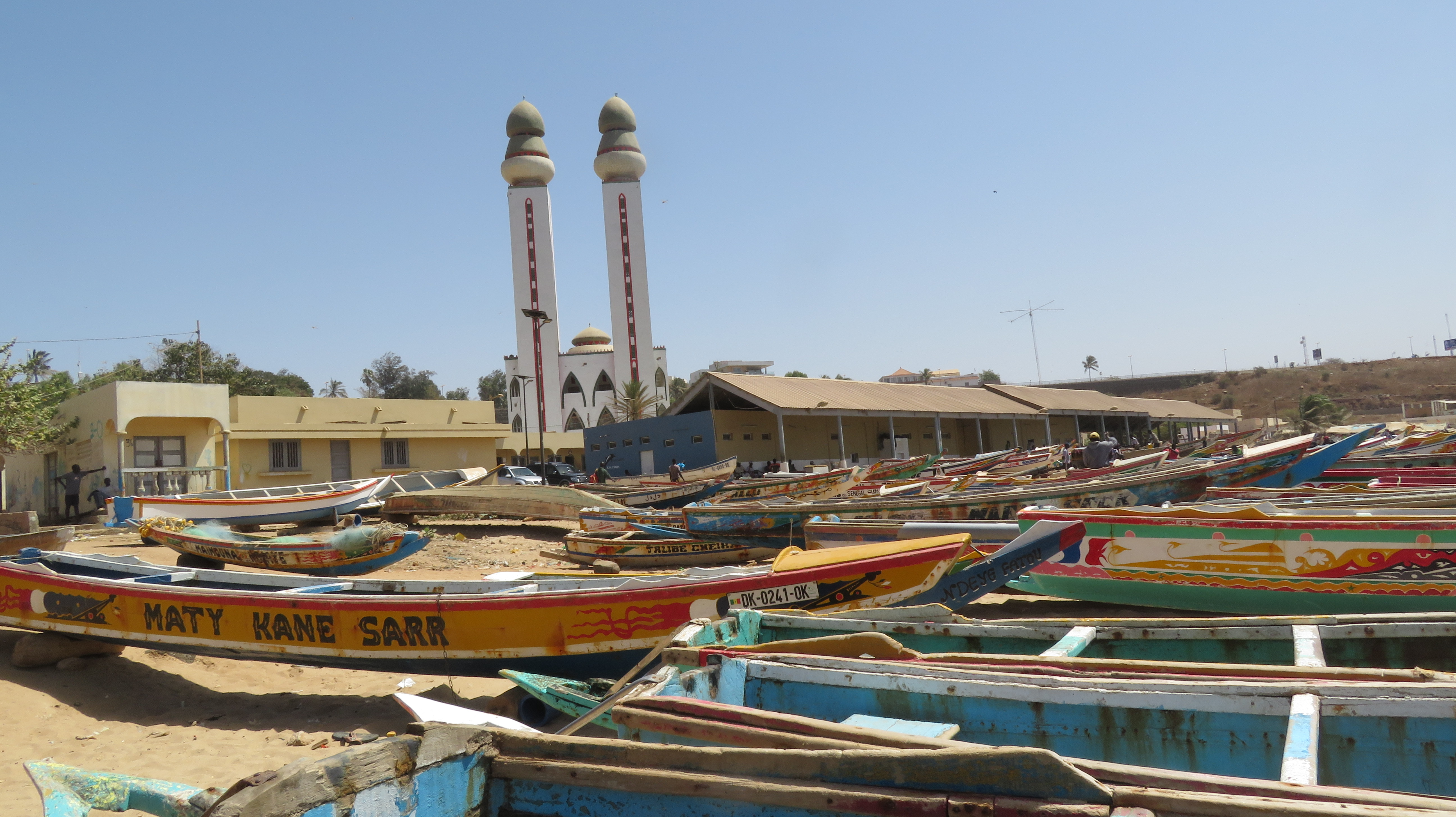 Plage Ouakam, der Strand in der Bucht von Ouakam unterhalb der Mosquée de la Divinité, ist ein Stützpunkt der traditionellen Fischerei mit Piroge This is an image with the theme "Africa on the Move or Transport" from: Senegal